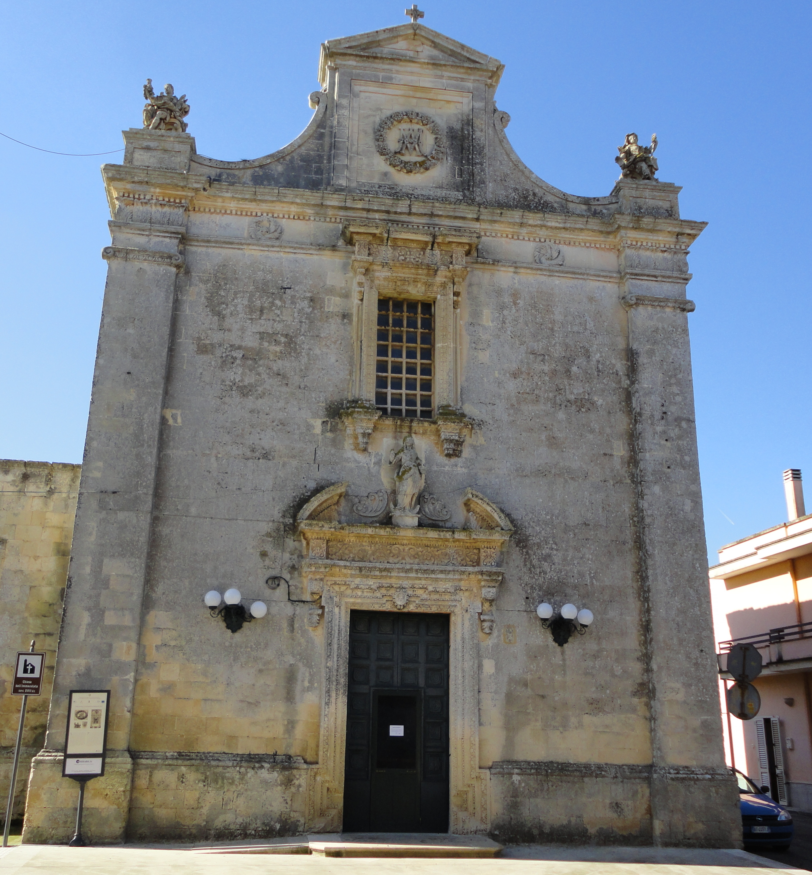 Chiesa dell'Immacolata di Castrignano de' Greci